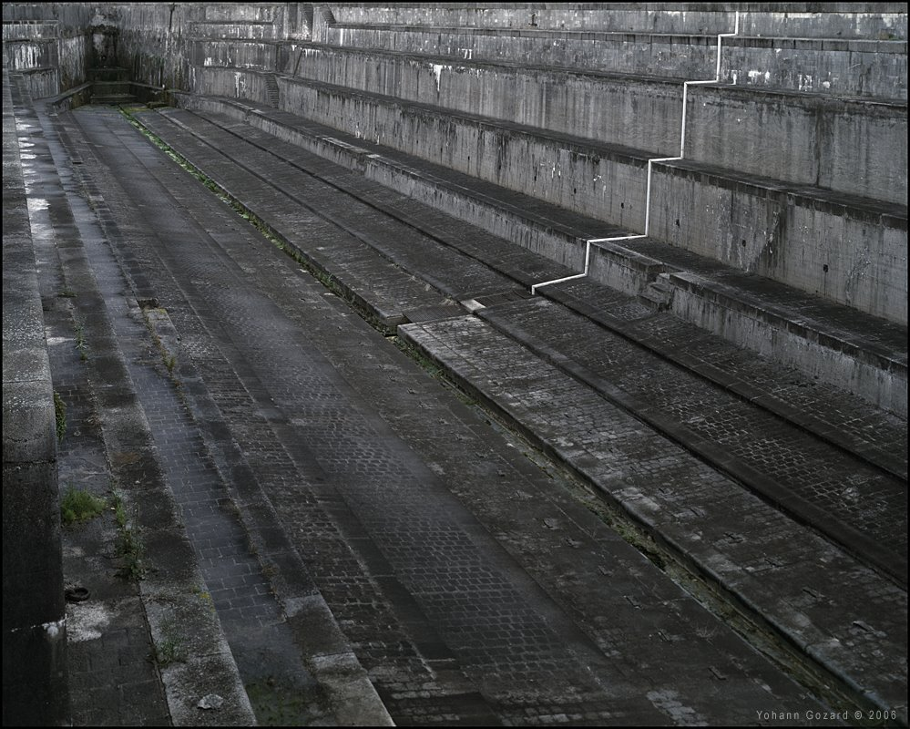 Rochefort (France) : La forme Napoléon III, forme de radoub du XIXème siècle